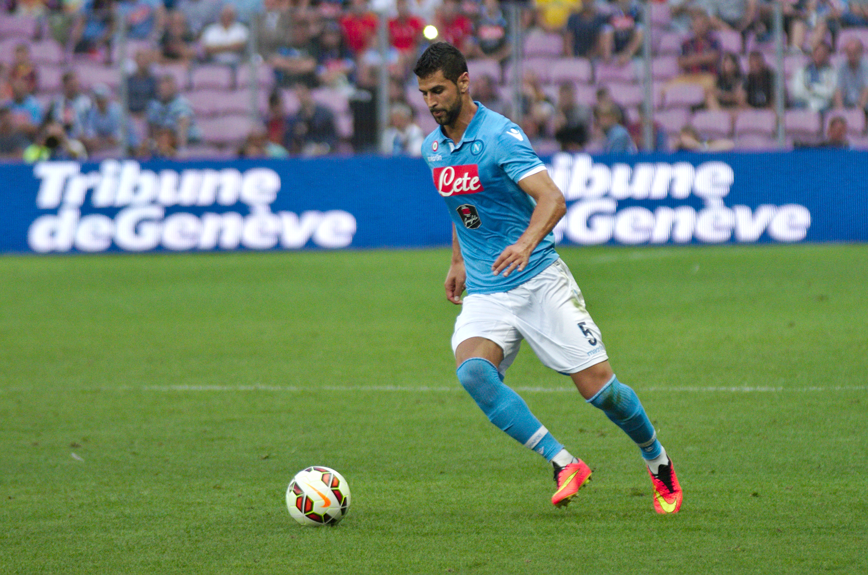 Barça v Napoli, 2014. Miguel Britos.